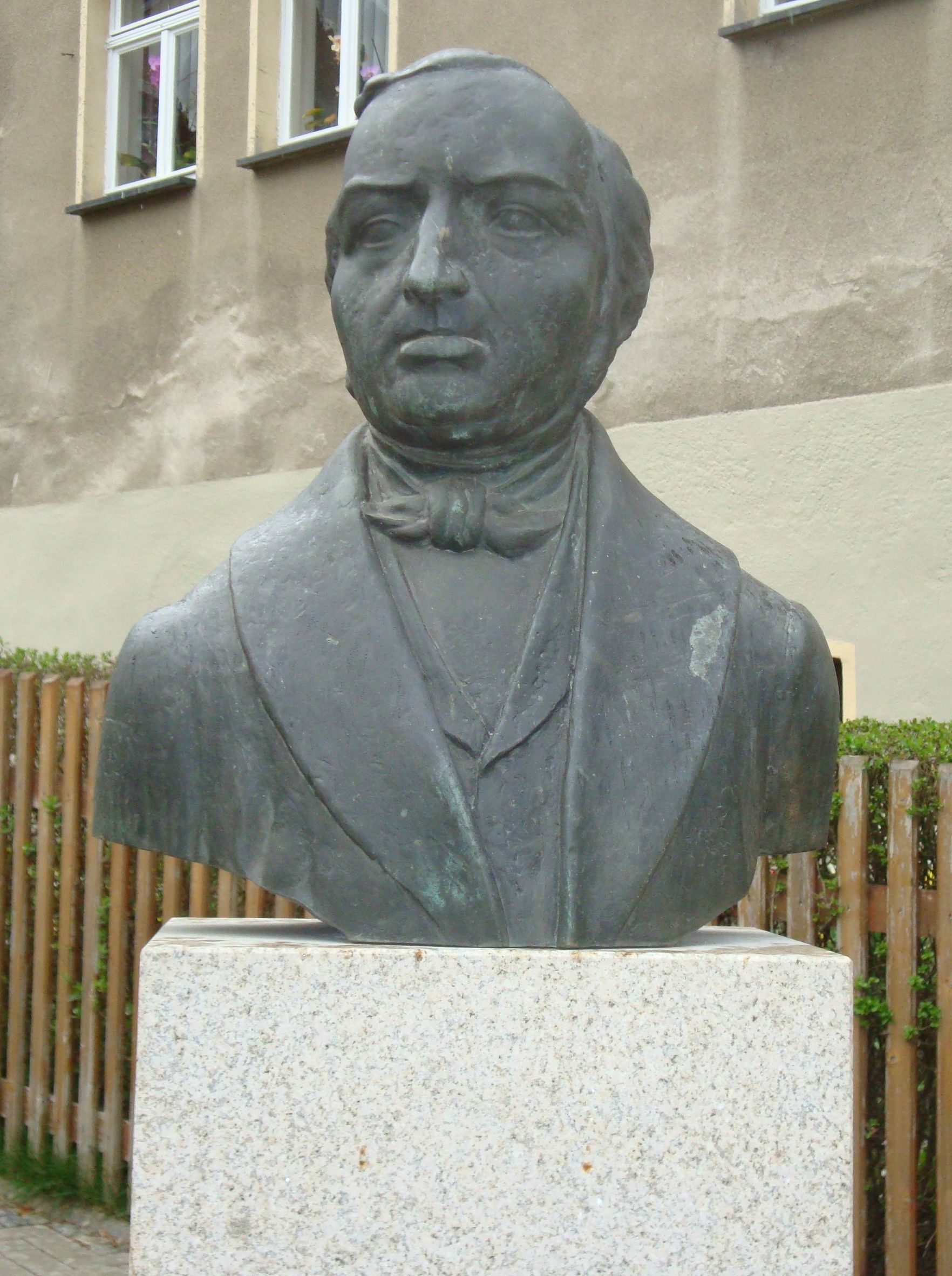 Denkmal für Carl Gotthelf Todt in Adorf/Vogtl.